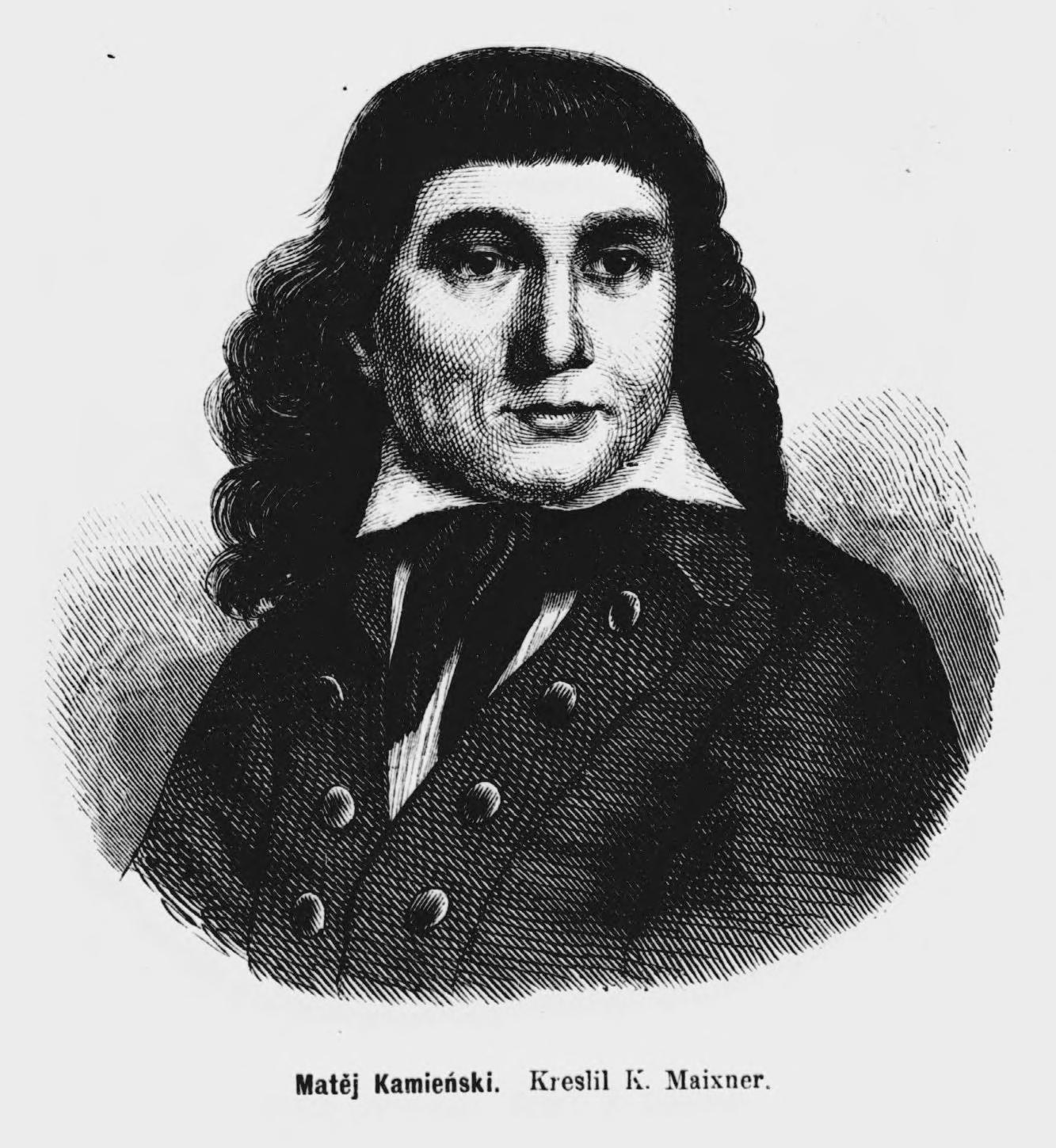 Portrait of Maciej Kamieński (1734 - 1821), Polish composer.